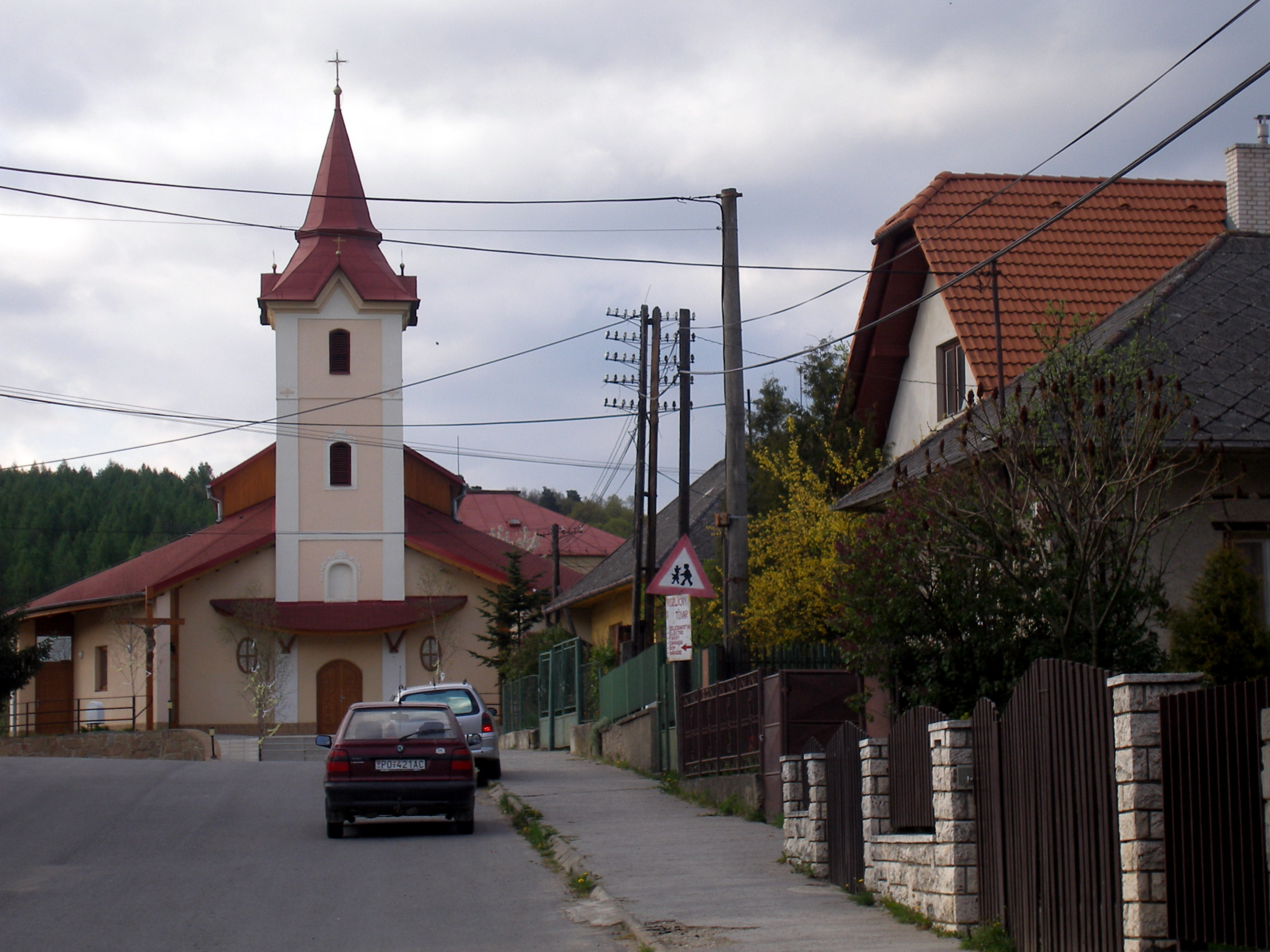 Obec Gregorovce okres Prešov región Šariš